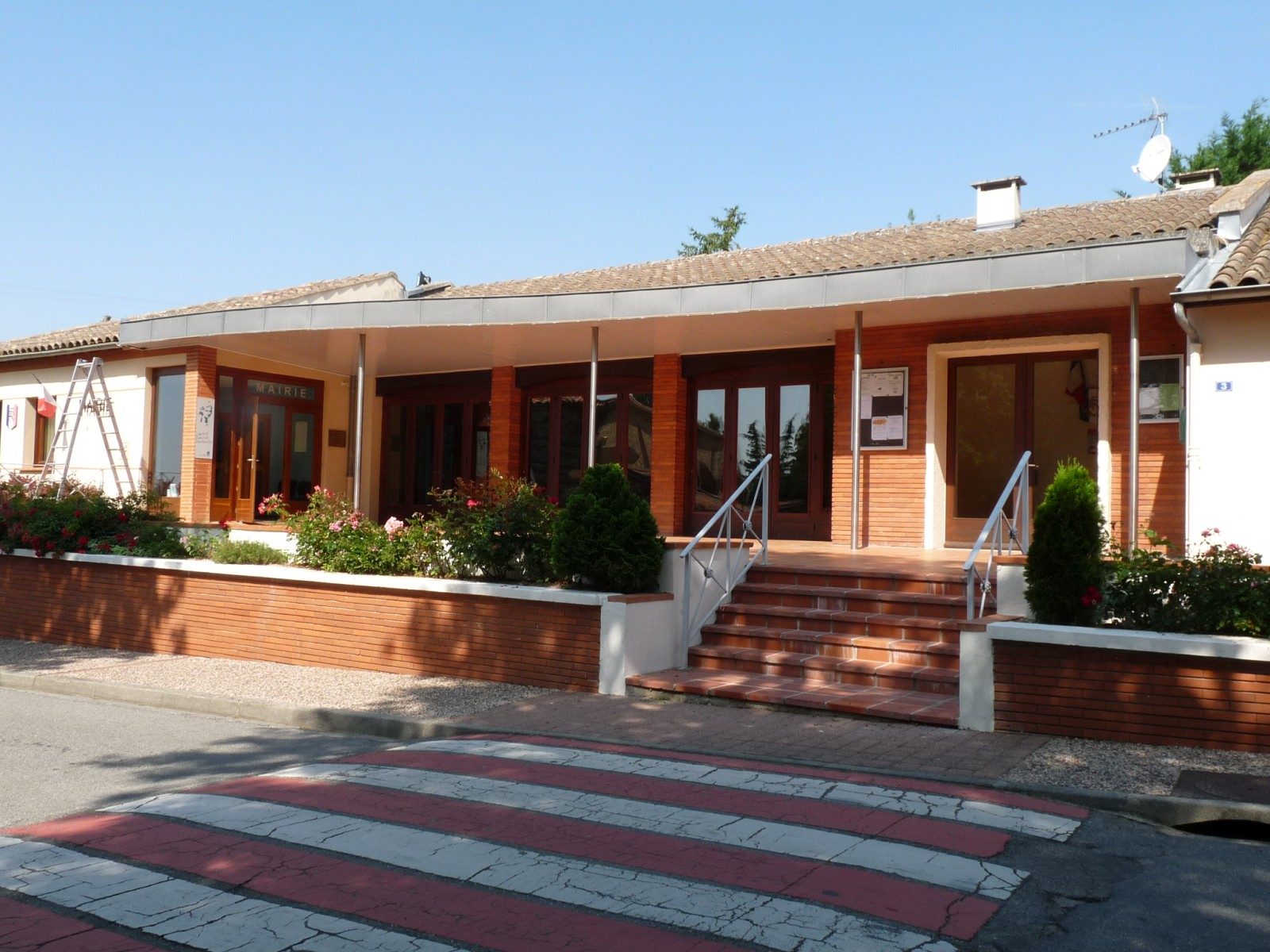 Mairie de Mauremont, Haute-Garonne, France